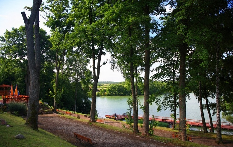 Ublik, województwo warmińsko-mazurskie, powiat piski, gmina Orzysz